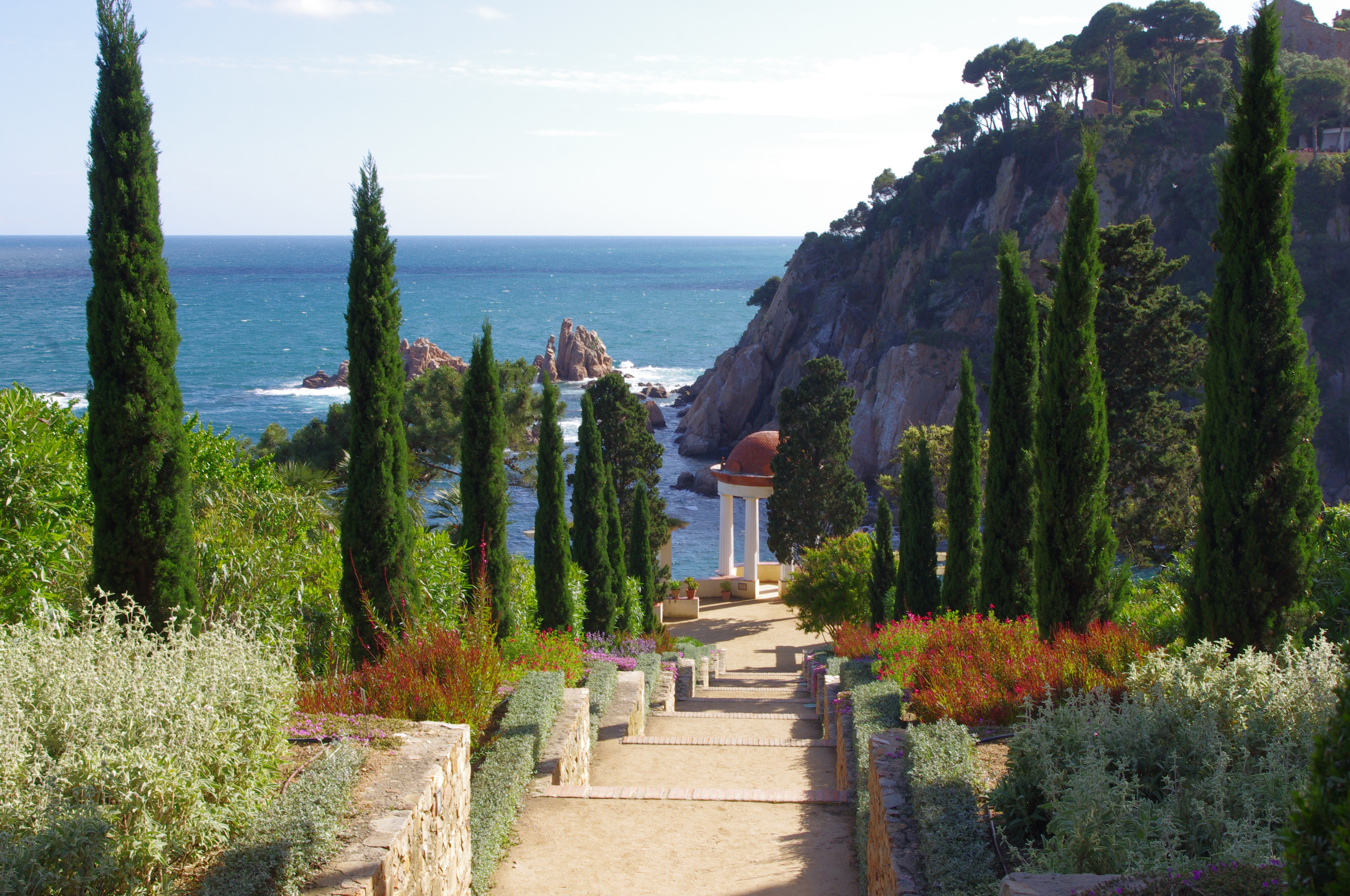 Vista del Jardí botànic Marimurtra, de Blanes.